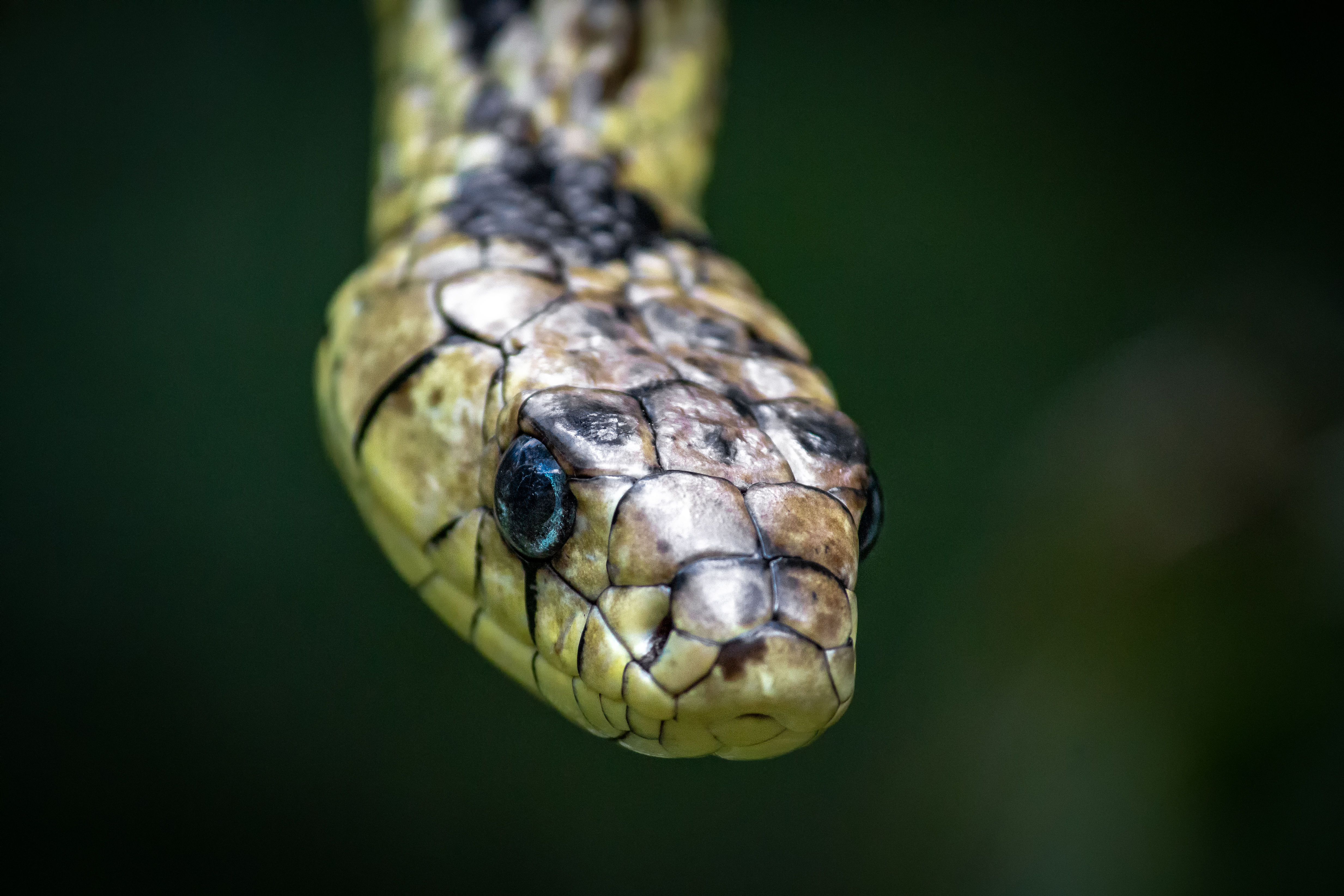 Spilotes pullatus por Luan Alves Chaves- Expedição PETAR 2020